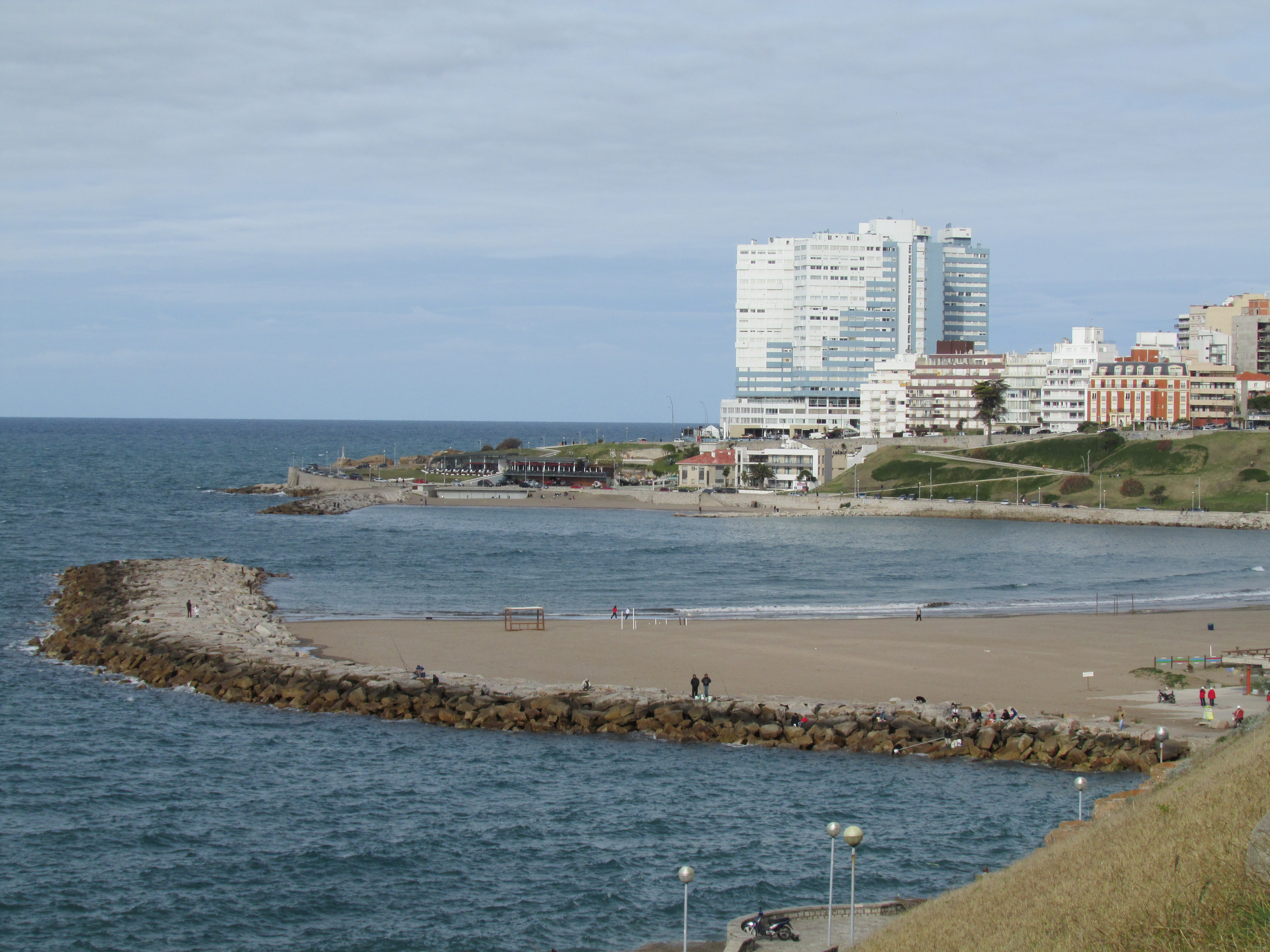 Playa Varese y Cabo Corrientes en Mar del Plata, provincia de Buenos Aires, Argentina.